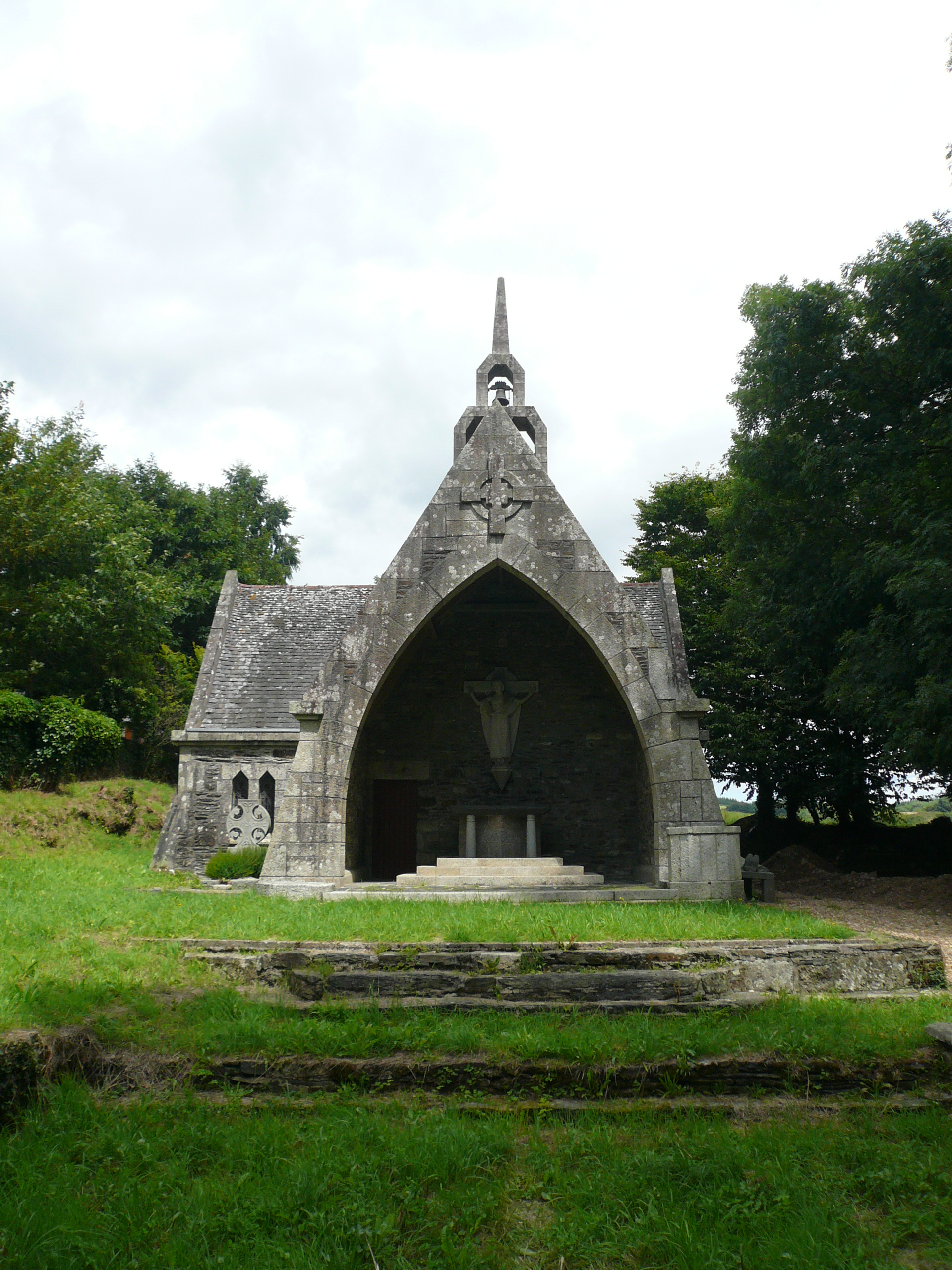 Vue générale de la façade occidentale de la chapelle de Coat-Quéau édifiée par James Bouillé, à Scrignac, Finistère, Bretagne, France.